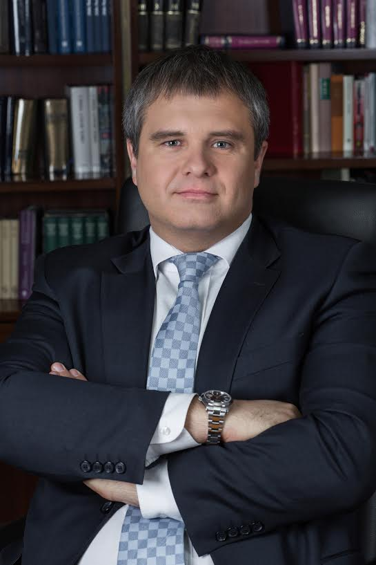 Роман Путин